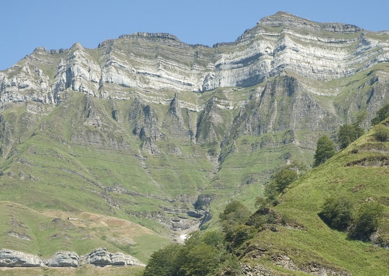 Pico de Castro Valnera, en los montes de Lunada.